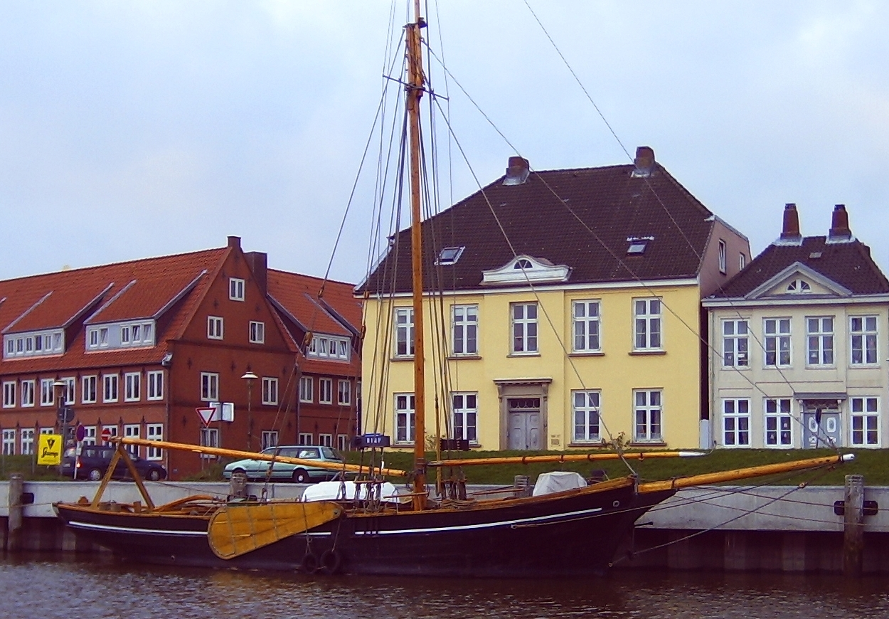 Das älteste fahrtüchtige Segelschiff Deutschlands, die Rigmor von Glueckstadt. Dahinter das denkmalgeschützte Gebäude Am Hafen 14. Bearbeitung des Bildes Image:Rigmor, 29 November 2006 im Binnenhafen Glueckstadt 01.jpg